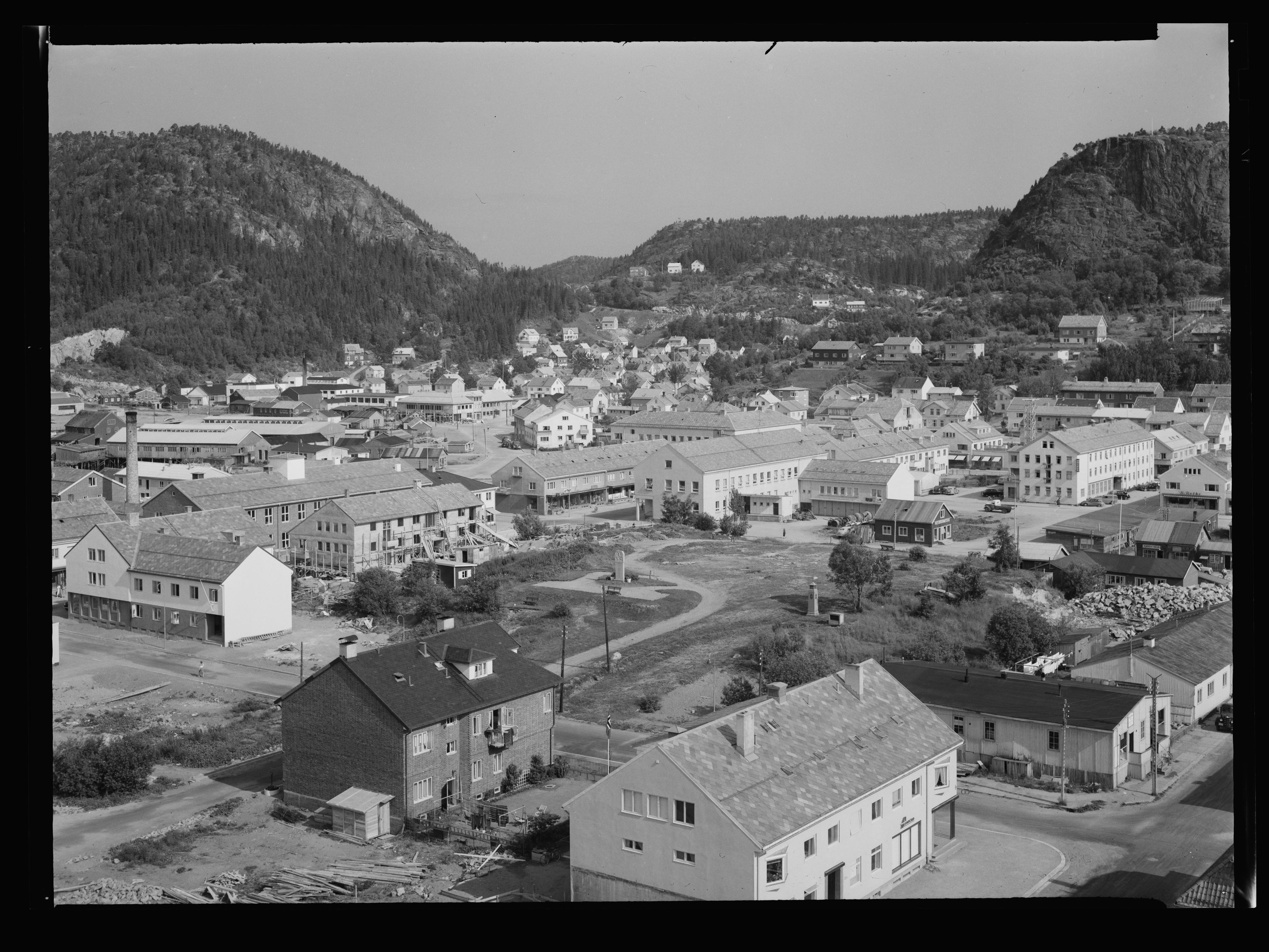 Bildet er hentet fra Nasjonalbibliotekets bildesamling. Anmerkninger til bildet var: Fotograf: L.S Namsos, Namsos, Nord Trøndelag